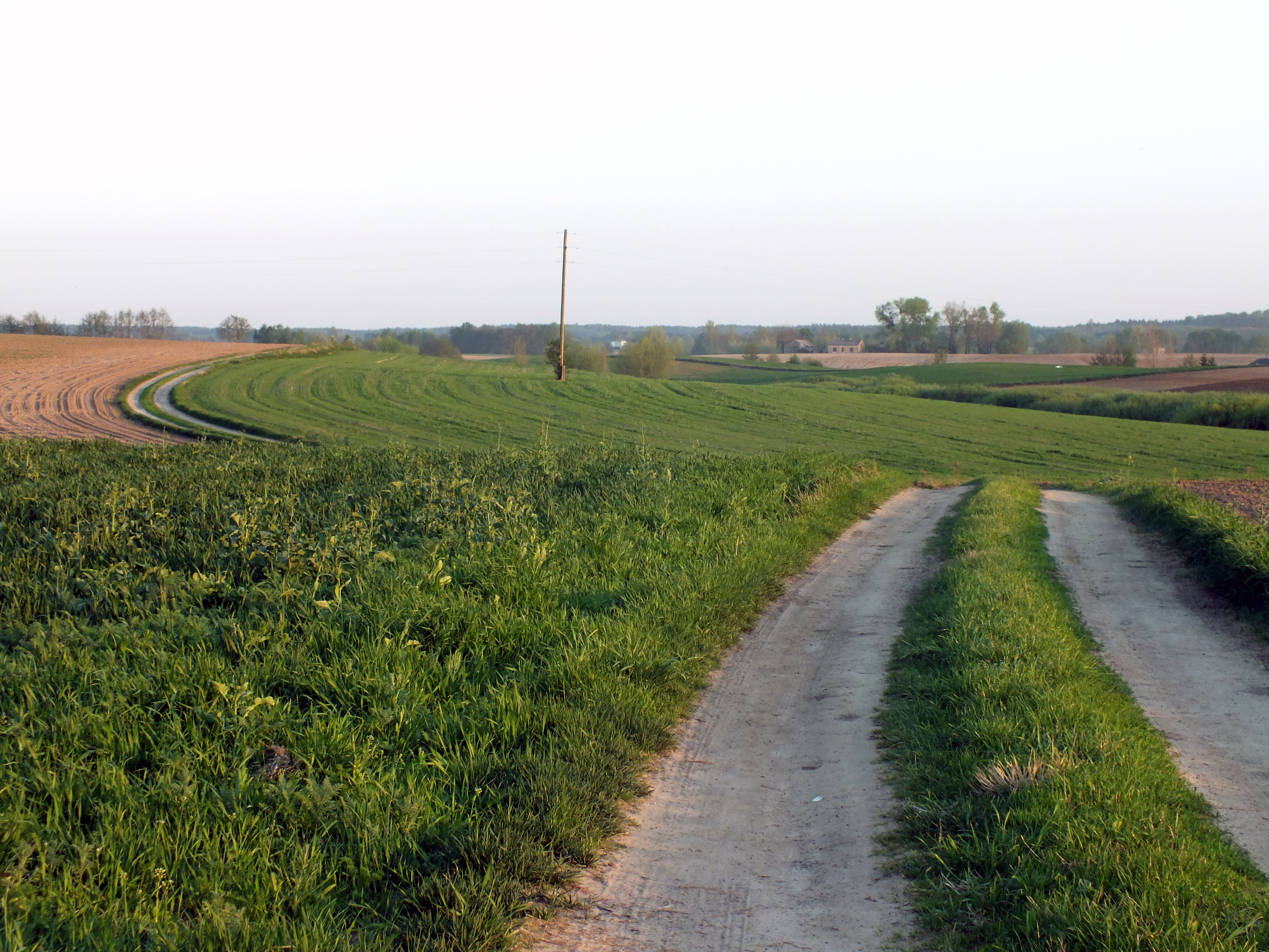 Krajobraz wsi Piskorczyn